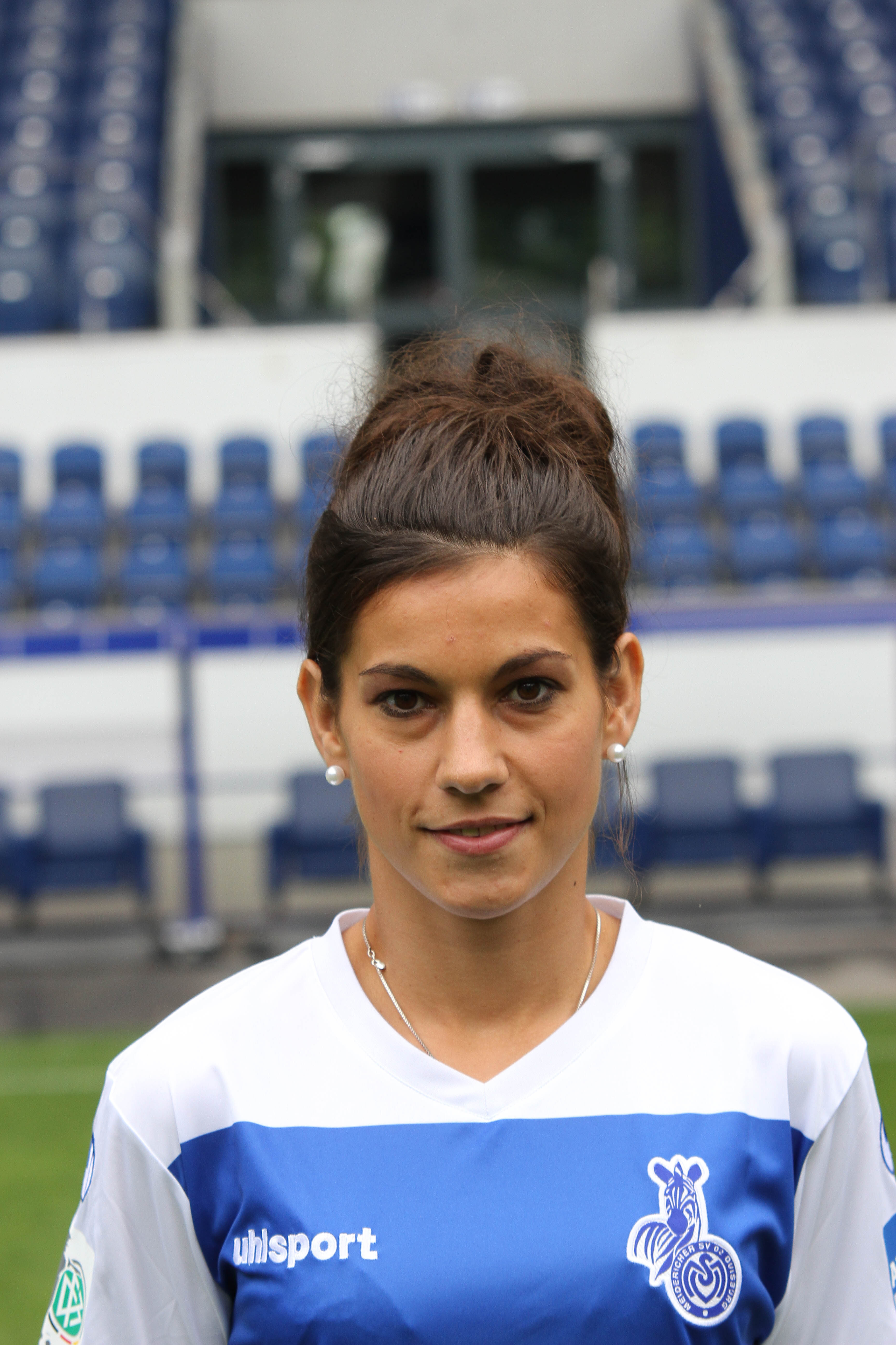 Kristina Šundov (2014)